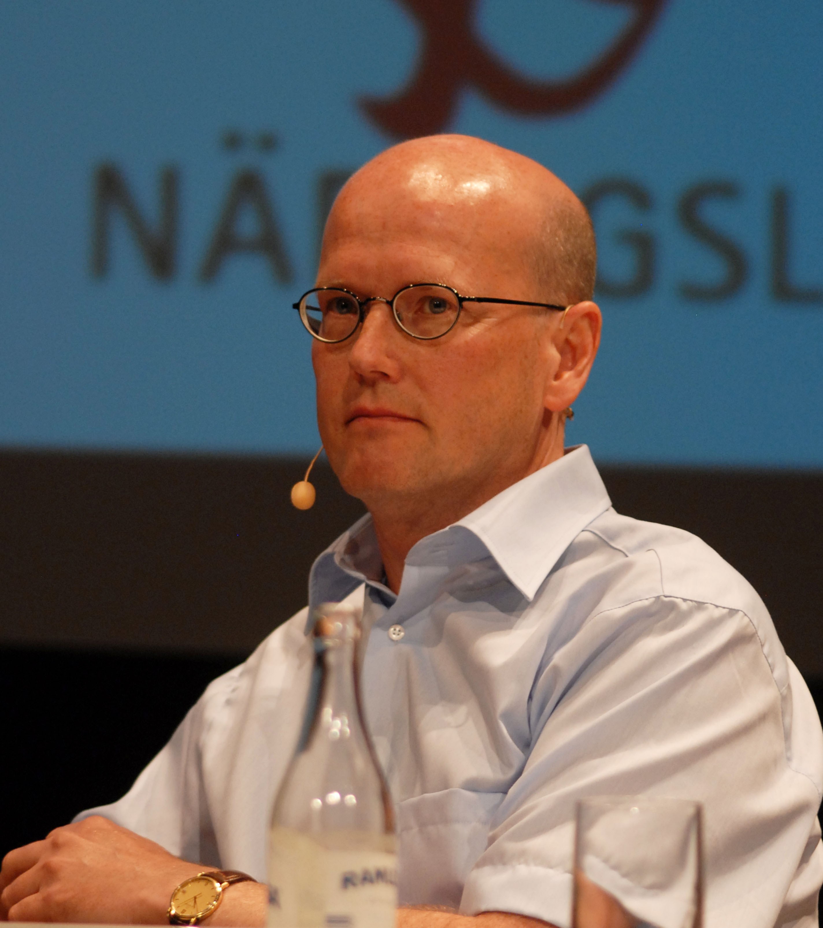 Deltagare: Magnus Henrekson, professor nationalekonomi Wanja Lundby-Wedin, ordförande LO Roger Mörtvik, samhällspolitisk chef TCO Thomas Östros, ekonomisk-politisk talesperson, Socialdemokraterna Moderator: Karin Pettersson, kommunikationschef Socialdemokraterna